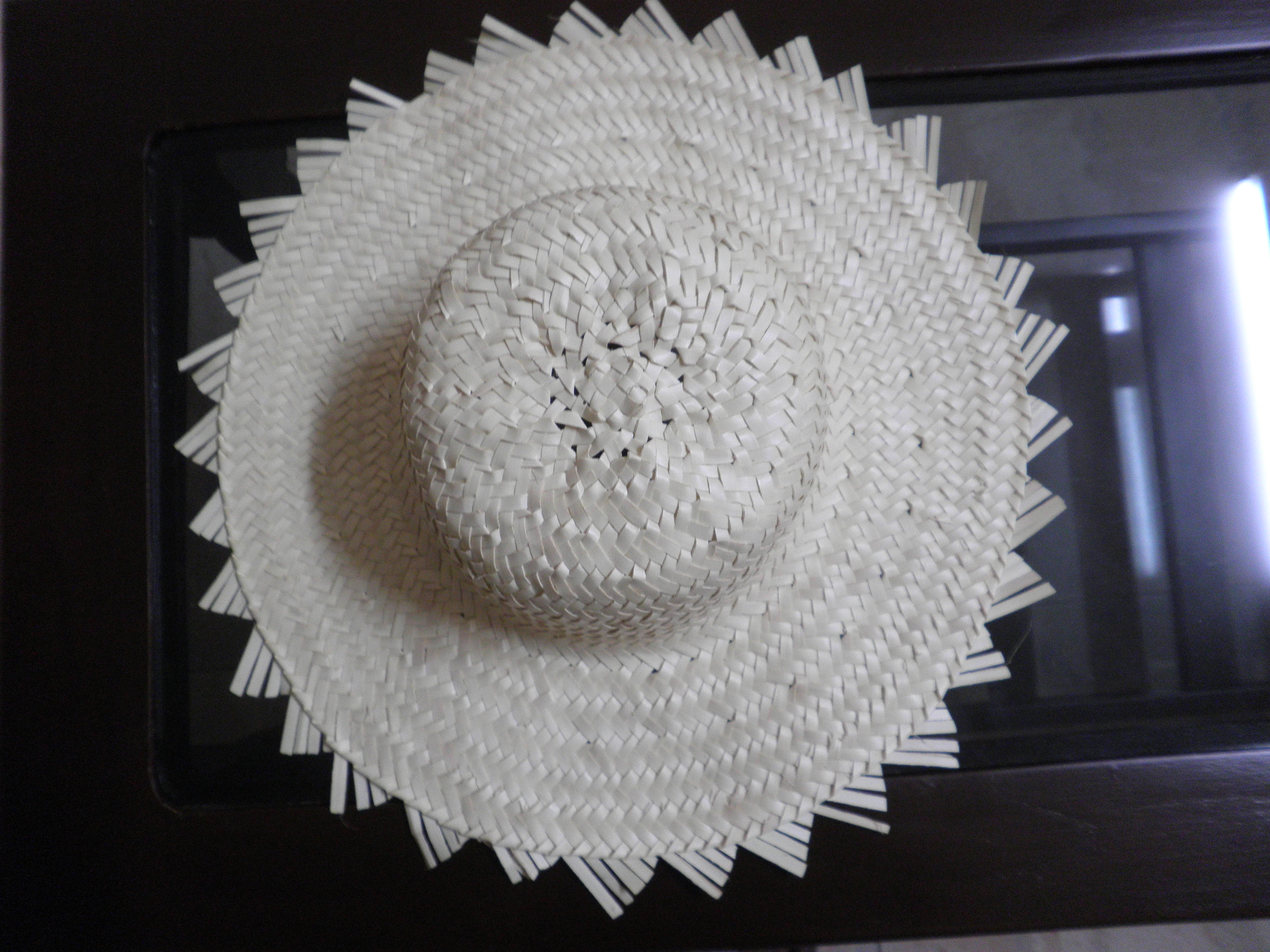 யாழ்ப்பாணத்தில் பனையோலையால் செய்யப்பட்ட தொப்பி